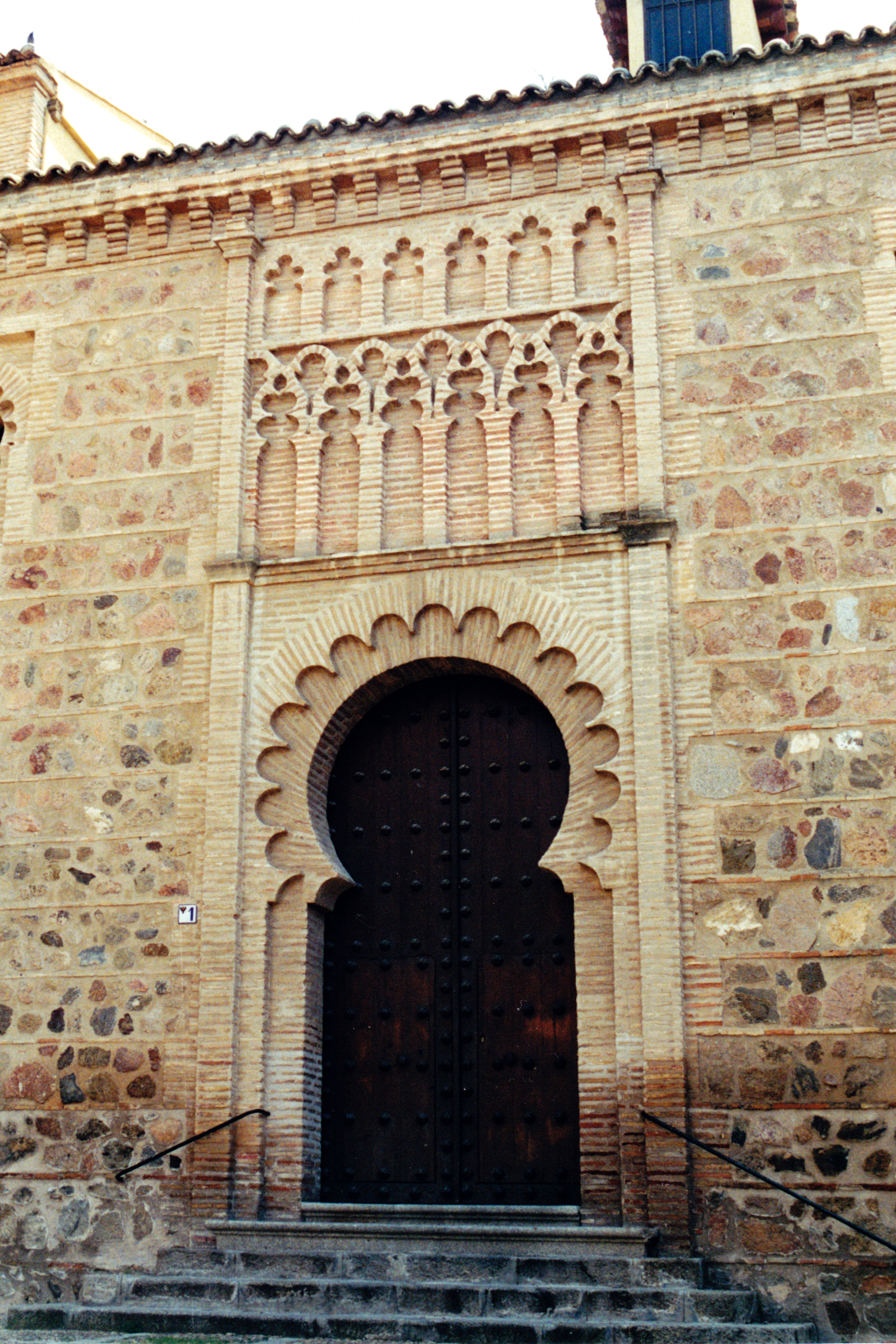 Espagne - Tolède - église Sainte Léocadie